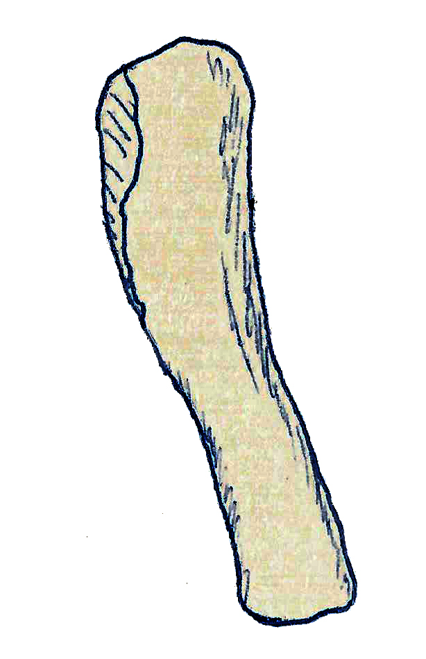 Illustration of a fossil of Aegyptosaurus